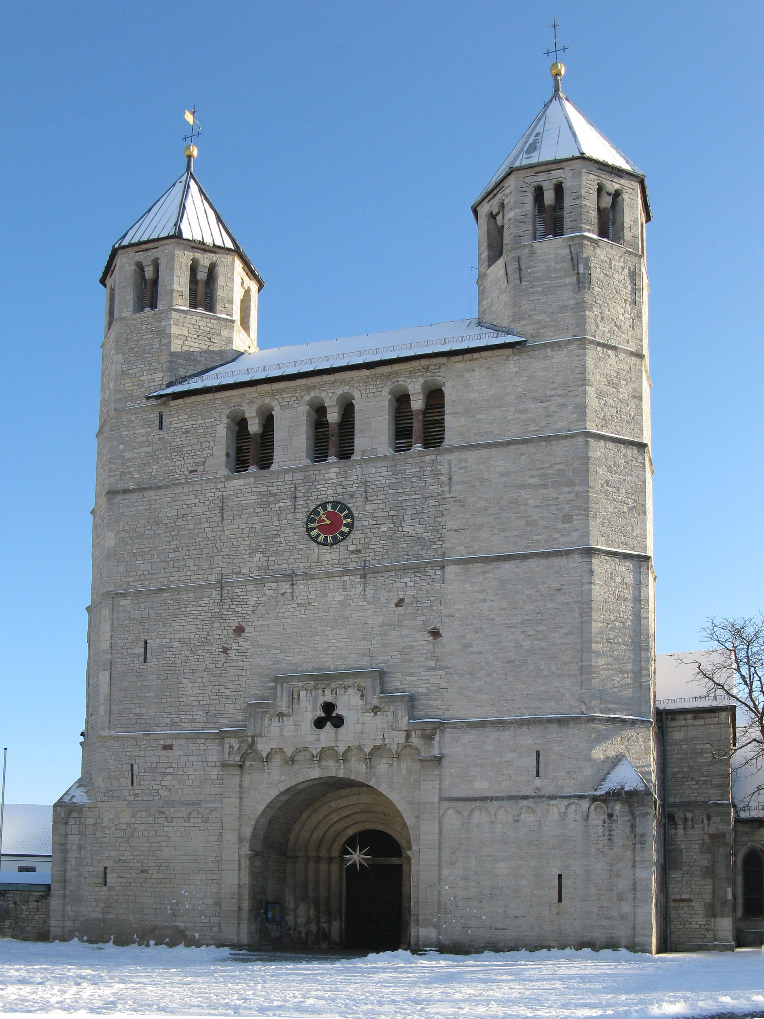 Bad Gandersheim: Stiftskirche, Westwerk